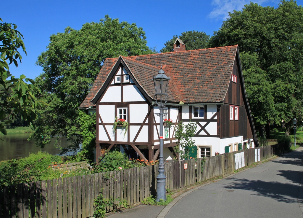 Dresden-Pillnitz: Blick auf das sogenannte "Fischerhaus" unweit vom Schloss Pillnitz. Das an der Elbe gelegene Haus entstand in der ersten Hälfte des 18. Jahrhunderts und wurde 1845 erweitert.